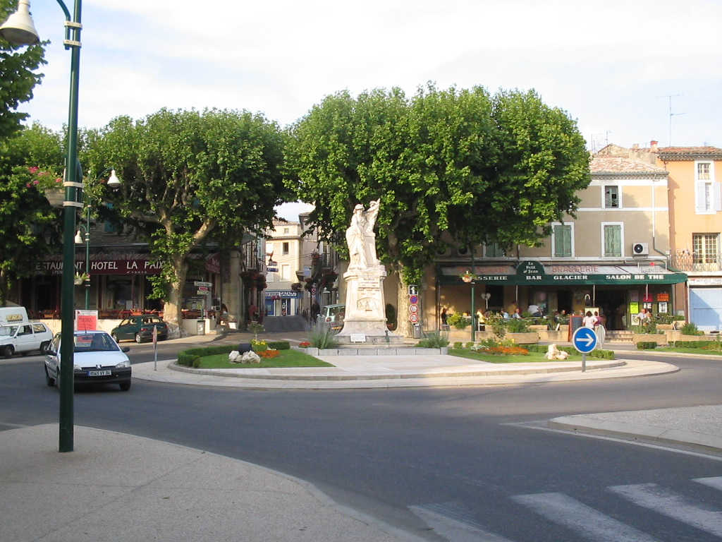 Valreas